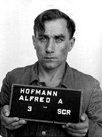 Foto des Angeklagten Alfred Andreas Hofmann (23.07.1904 - ?), SS-Obersturmführer im Konzentrationslager Buchenwald, dann Kommandoführer im Buchenwalder Außenlager Sonneberg im Case No. 000-Buchenwald-4 (US vs. Alfred Andreas Hoffman) Tried 17 Sept. 47, zu 5 Jahren Haft verurteilt.